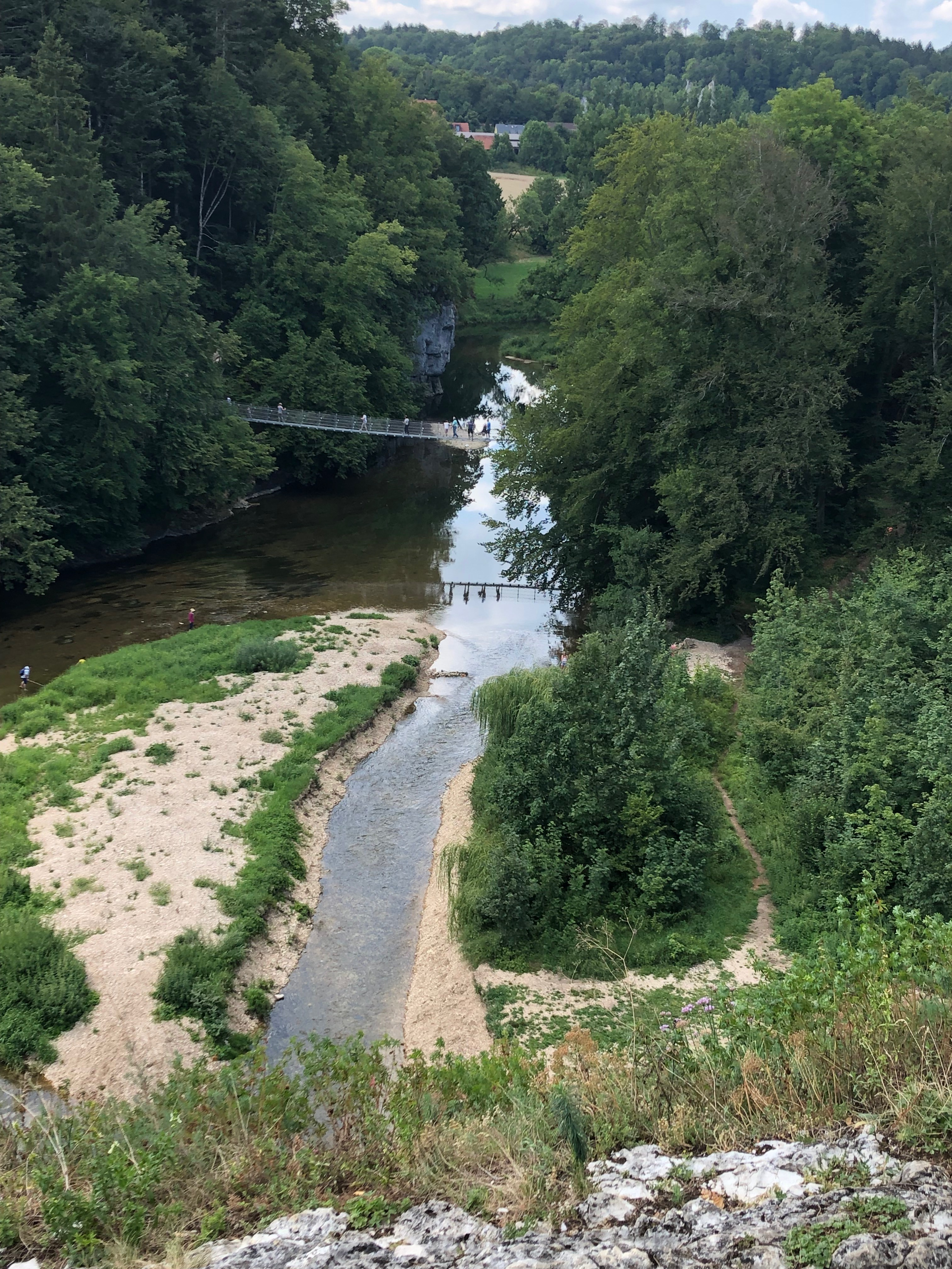 Die Donau vom Amalienfelsen im Fürstlichen Park Inzigkofen